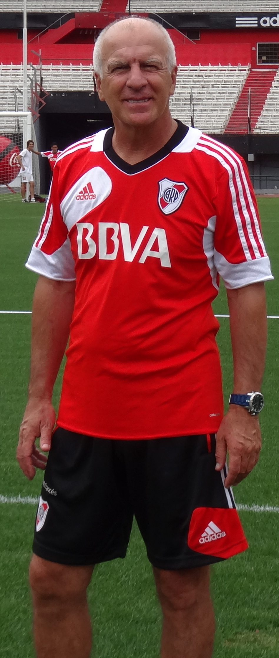 CA River Plate